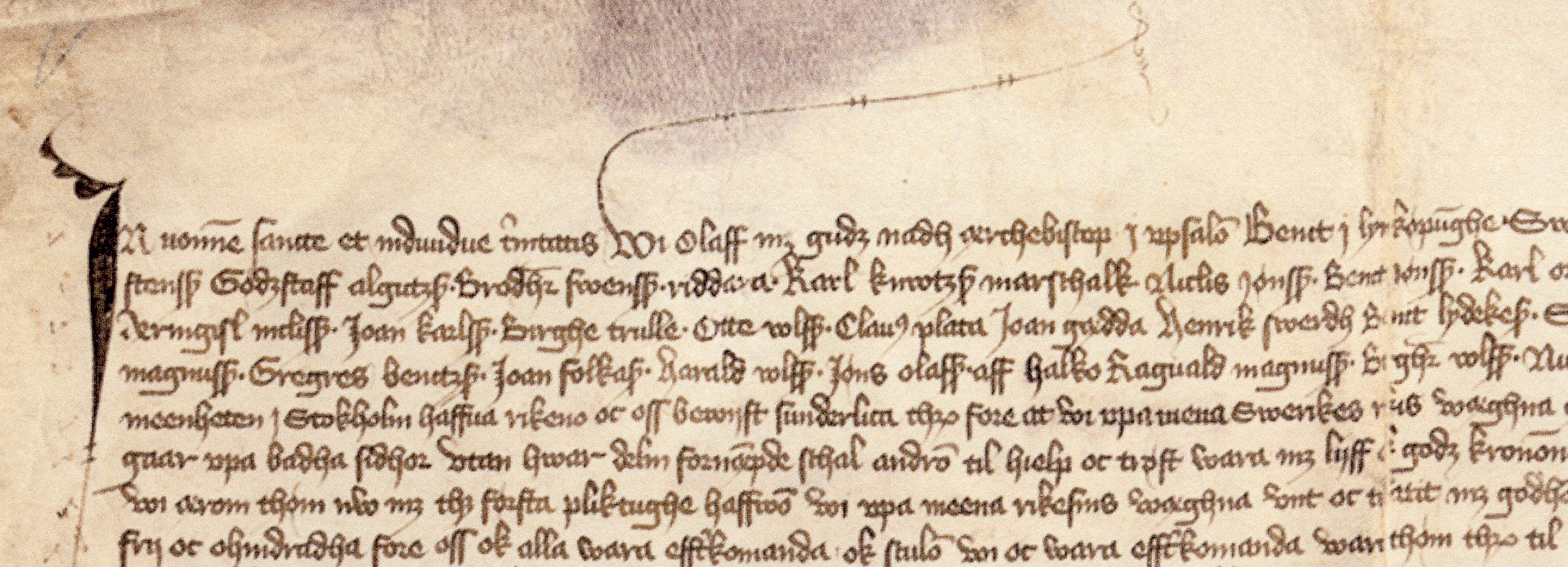 Stockholms privilegiebrev från 1 mai 1436, detalj. Brevet börjar med följande ord: In nomine sancte et indiuidue trinitatis. Vi Olaff, meth Gudz Nadh ærkebiscop i Upsalom, Bengt Lynköpunghe, Sven i Skara, Thomas i Strengnæs, Olaff i Vesterbros …